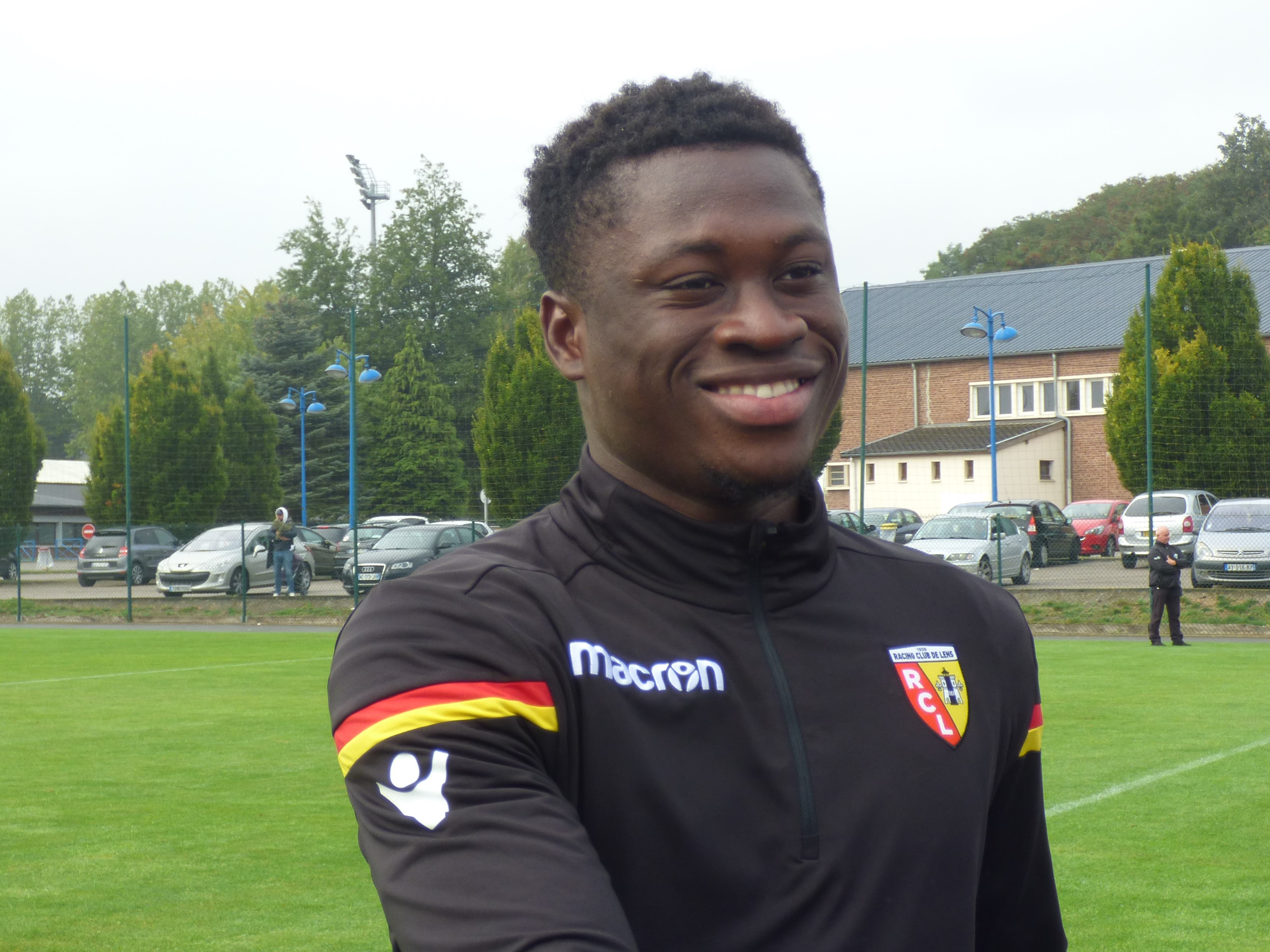 Arial Mendy lors d'un entraînement public du Racing Club de Lens, le 13 septembre 2018, au Centre technique et sportif de La Gaillette à Avion.